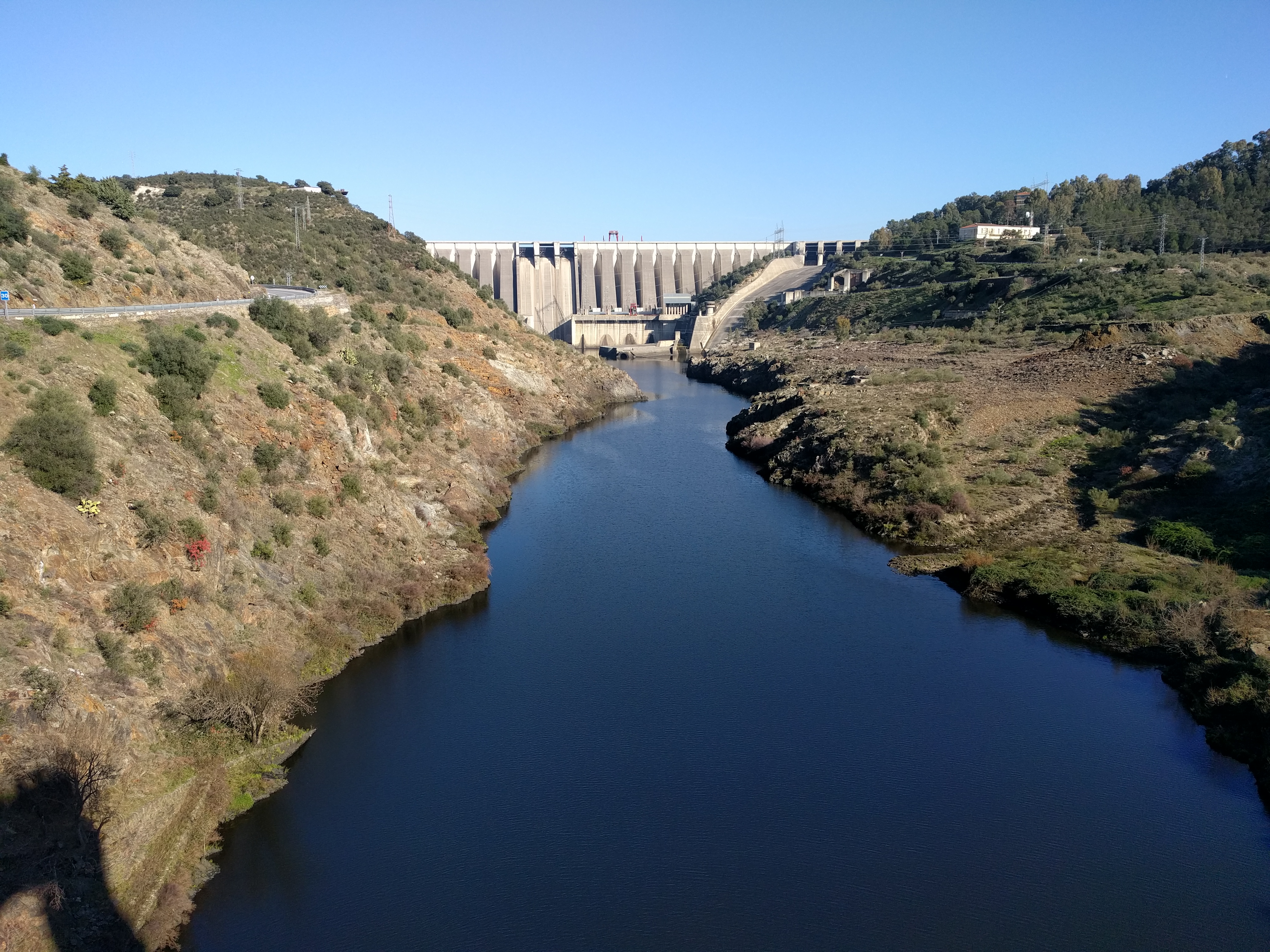 La presa de Alcántara desde el puente romano